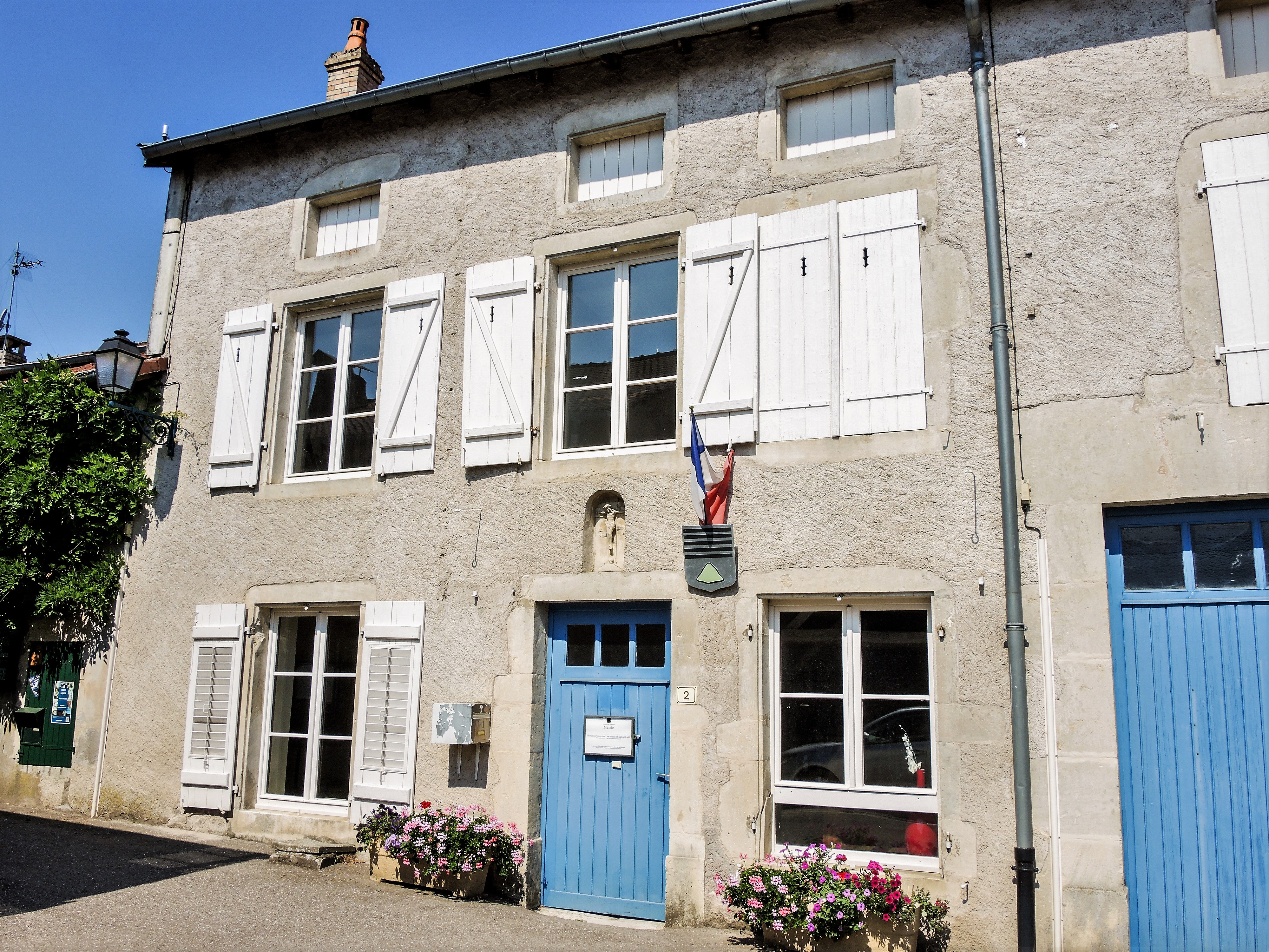 Façade de la mairie de Vaudémont. Meurthe-et-Moselle